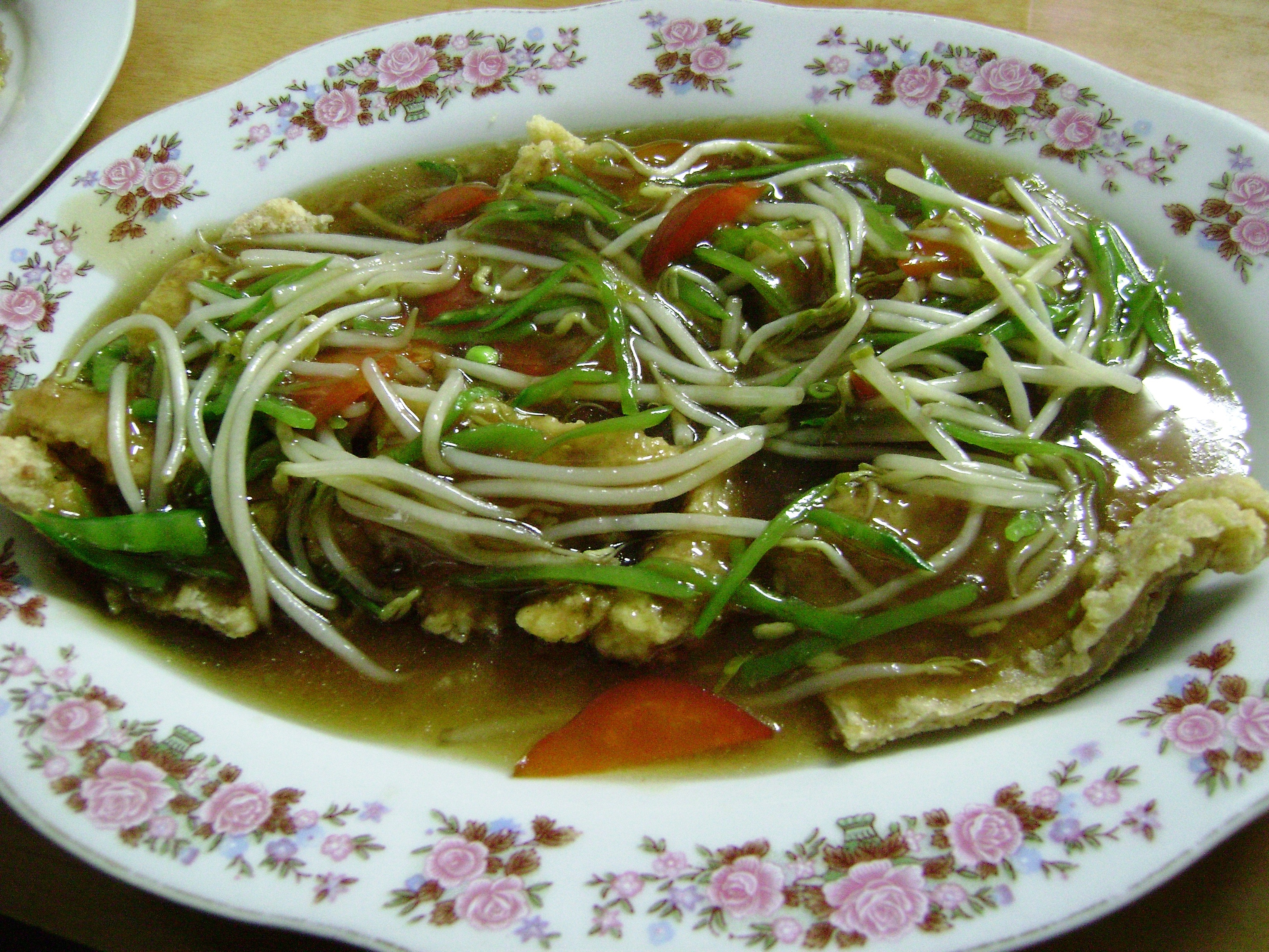 Chijaukay con frejolitos. Lima, Perú.